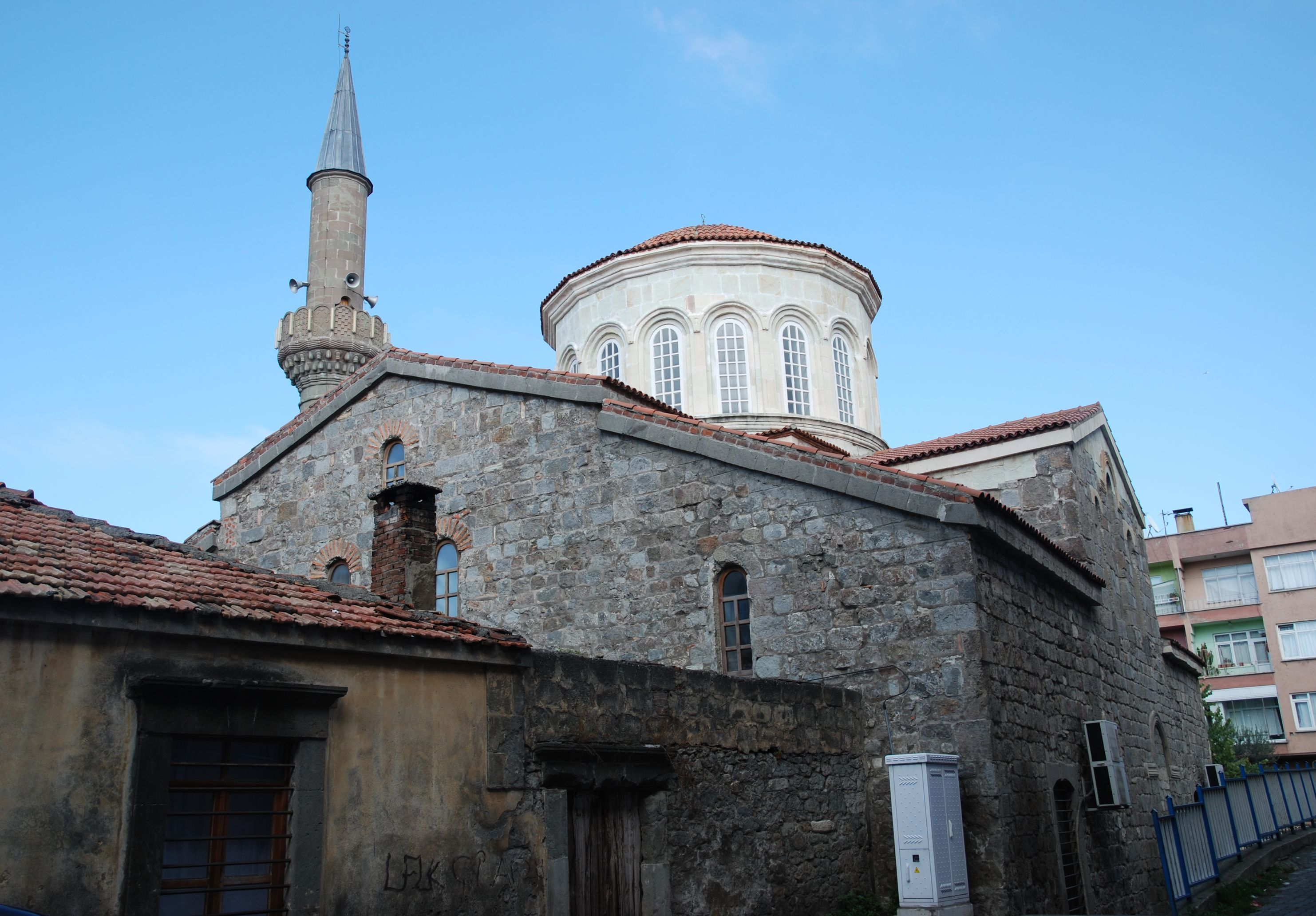 Trabzon, Turkey, Yeni Cuma Camii